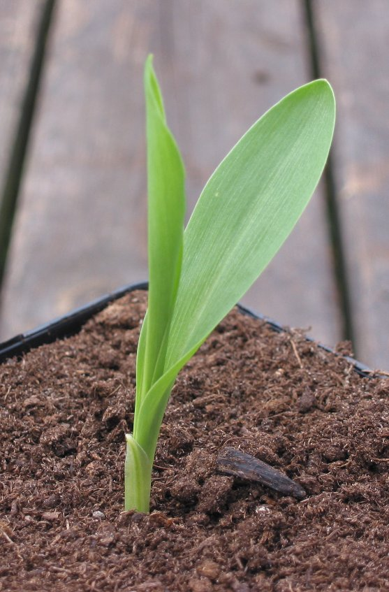 zelfgemaakte foto; kiemplant met eerste blad uit coleoptyl